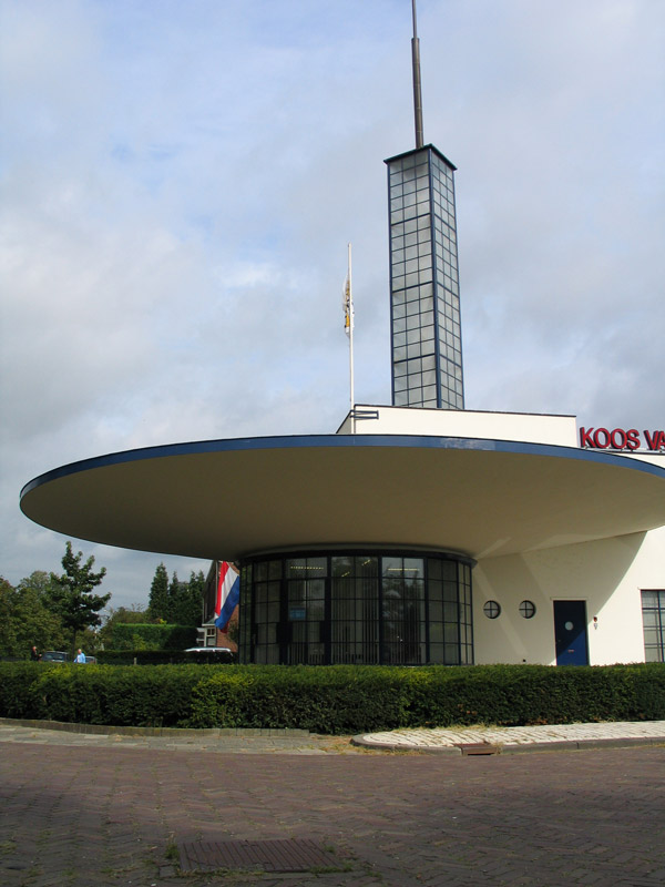 Benzinestation Nijmegen (The Netherlands). Gebouwd in 1936. Rijksmonument. Een fraai voorbeeld van Nieuwe Zakelijkheid